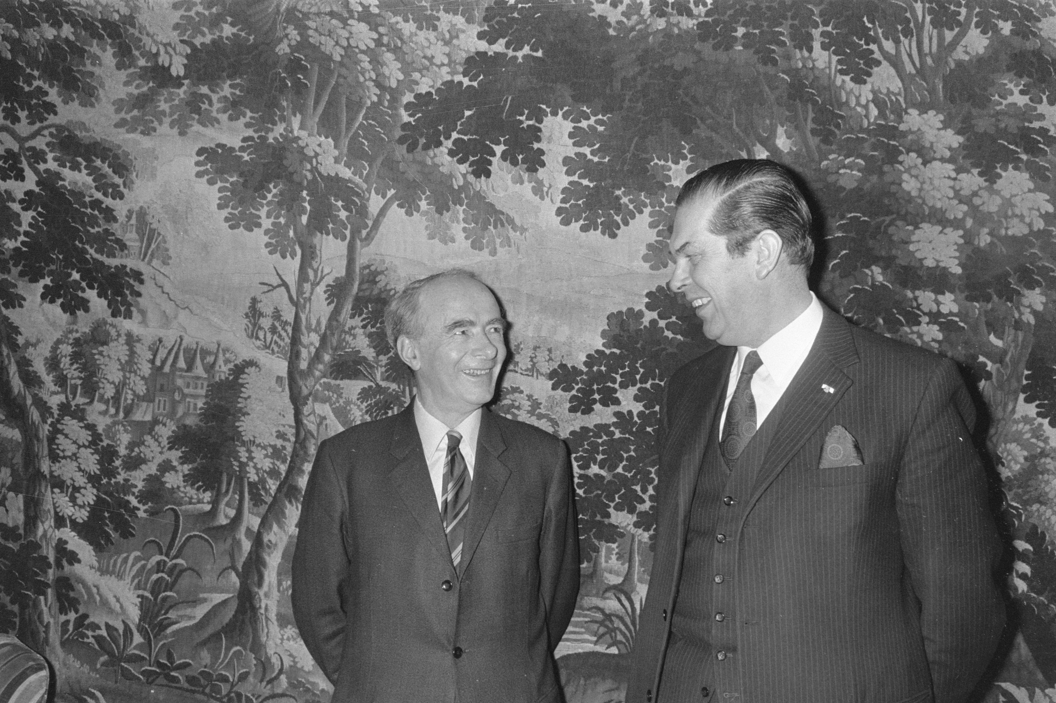 Collectie / Archief : Fotocollectie Anefo Reportage / Serie : [ onbekend ] Beschrijving : Premier Biesheuvel ontvangt premier Trygve Bratteli van Noorwegen in Catshuis Den Haag Datum : 8 januari 1972 Locatie : Den Haag, Zuid-Holland Trefwoorden : ontvangsten, premiers Persoonsnaam : Biesheuvel, Barend Fotograaf : Punt, […] / Anefo Auteursrechthebbende : Nationaal Archief Materiaalsoort : Negatief (zwart/wit) Nummer archiefinventaris : bekijk toegang 2.24.01.05 Bestanddeelnummer : 925-2933